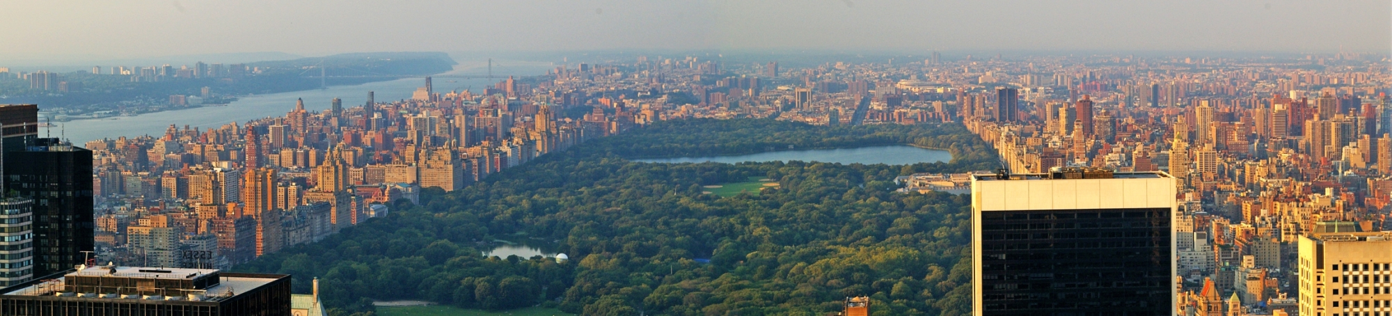 Blick vom Rockefeller Center Richtung Central Park